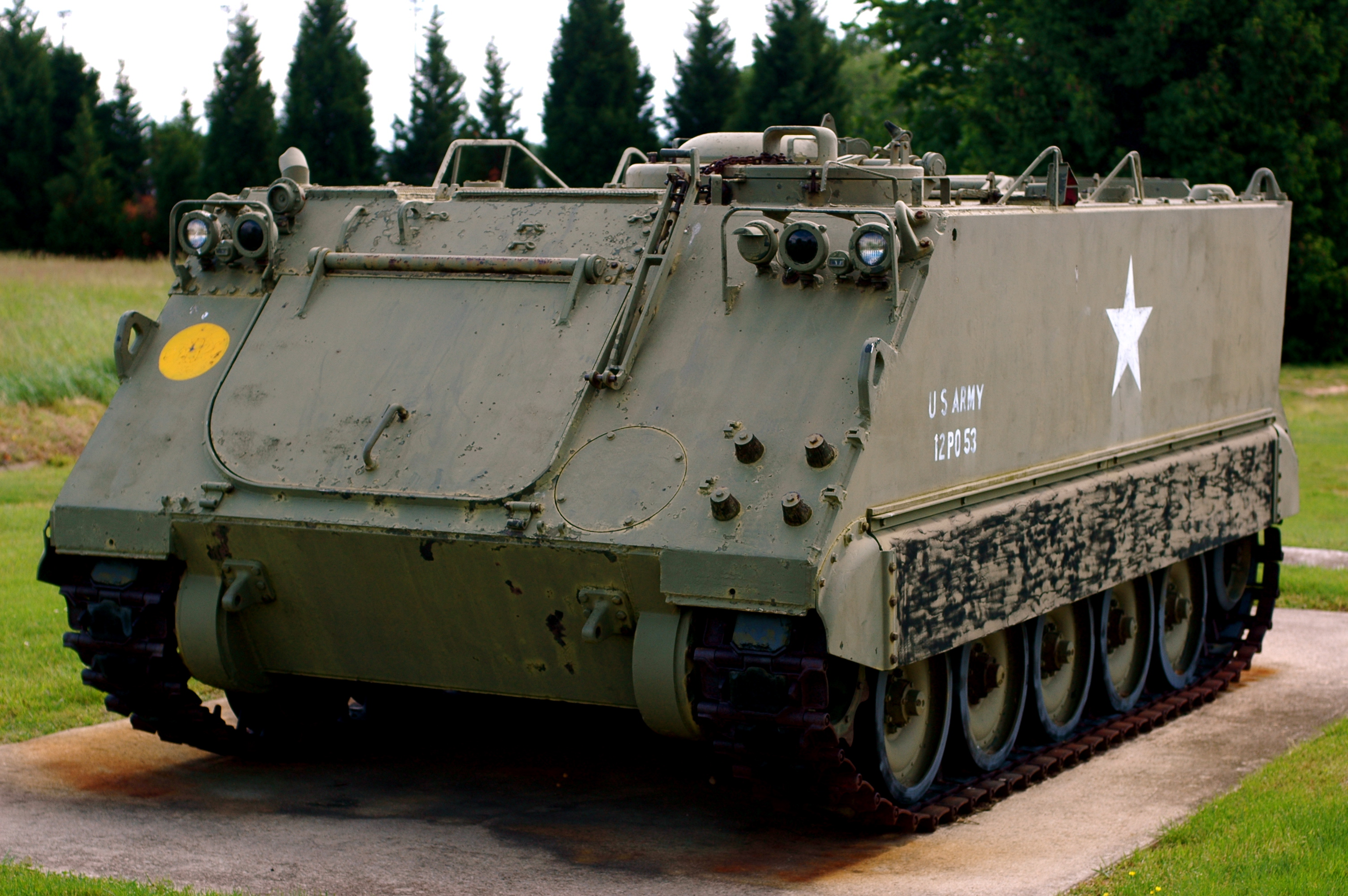 Transporter opancerzony M113 wystawiany w Fort Meade Museum.